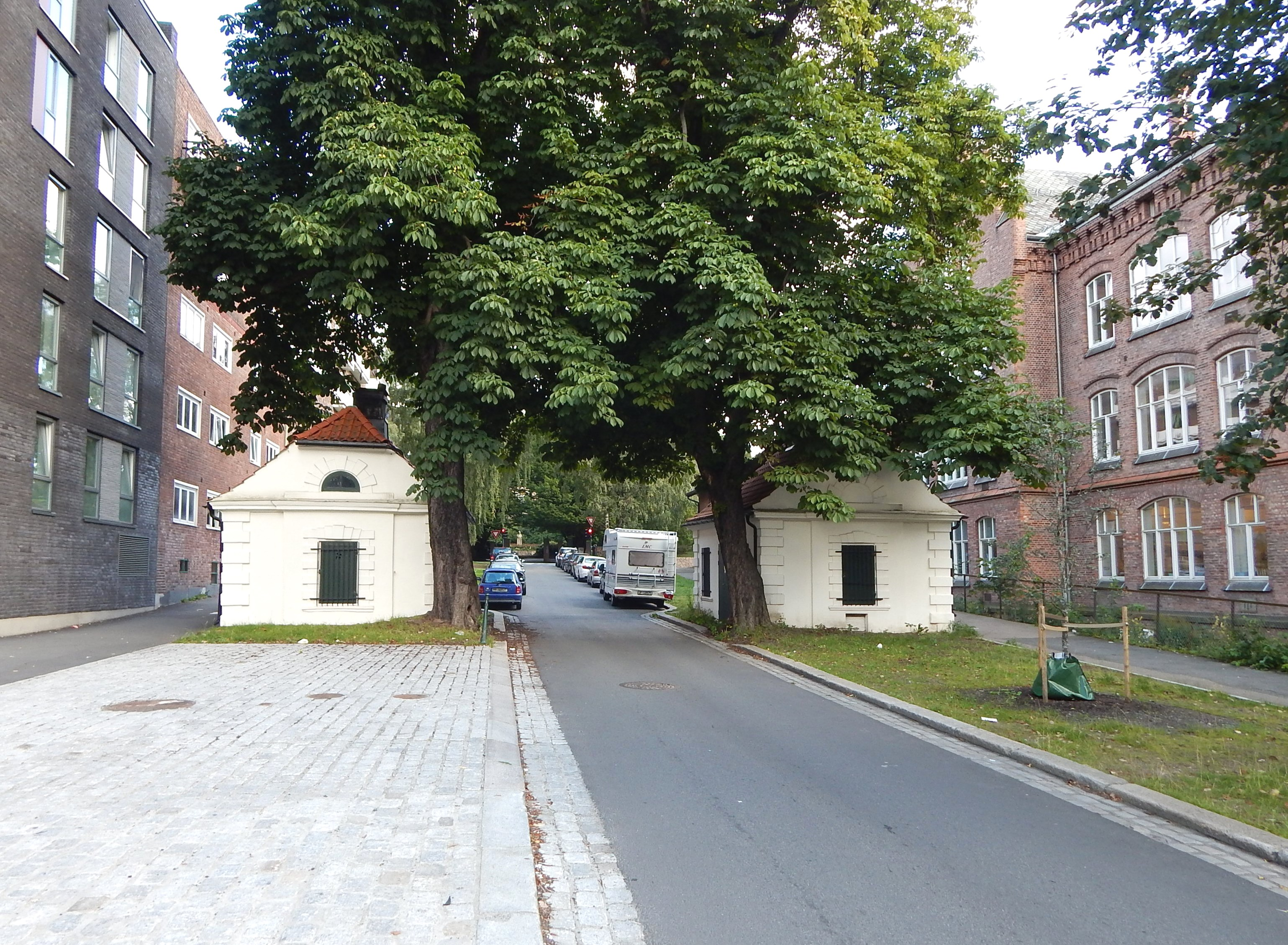 Vestre portstuer ved Tøyen hovedgård på hver sin side av Blytts gate